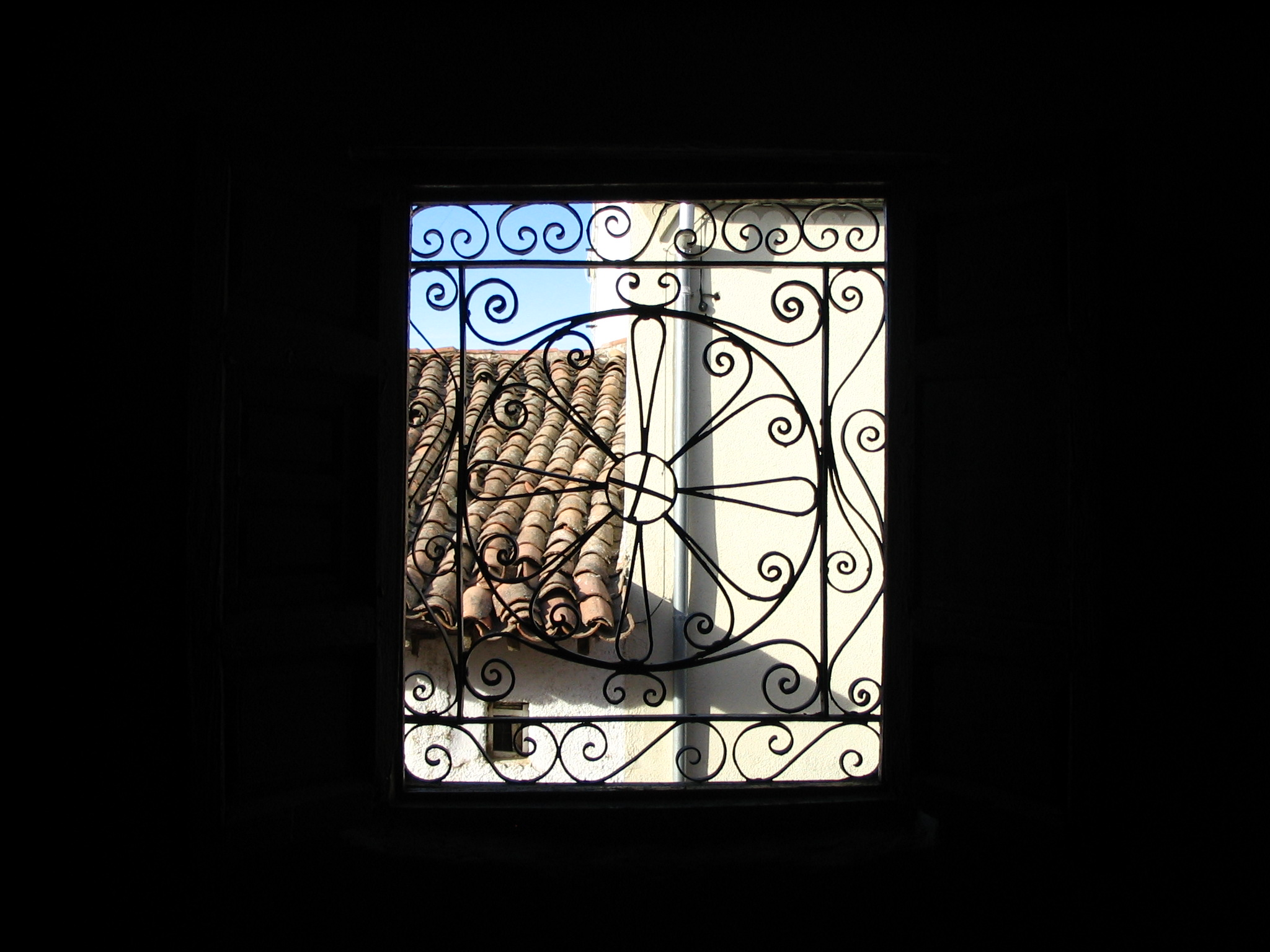 Rejería de una ventana c/ Cristo,9 Macotera